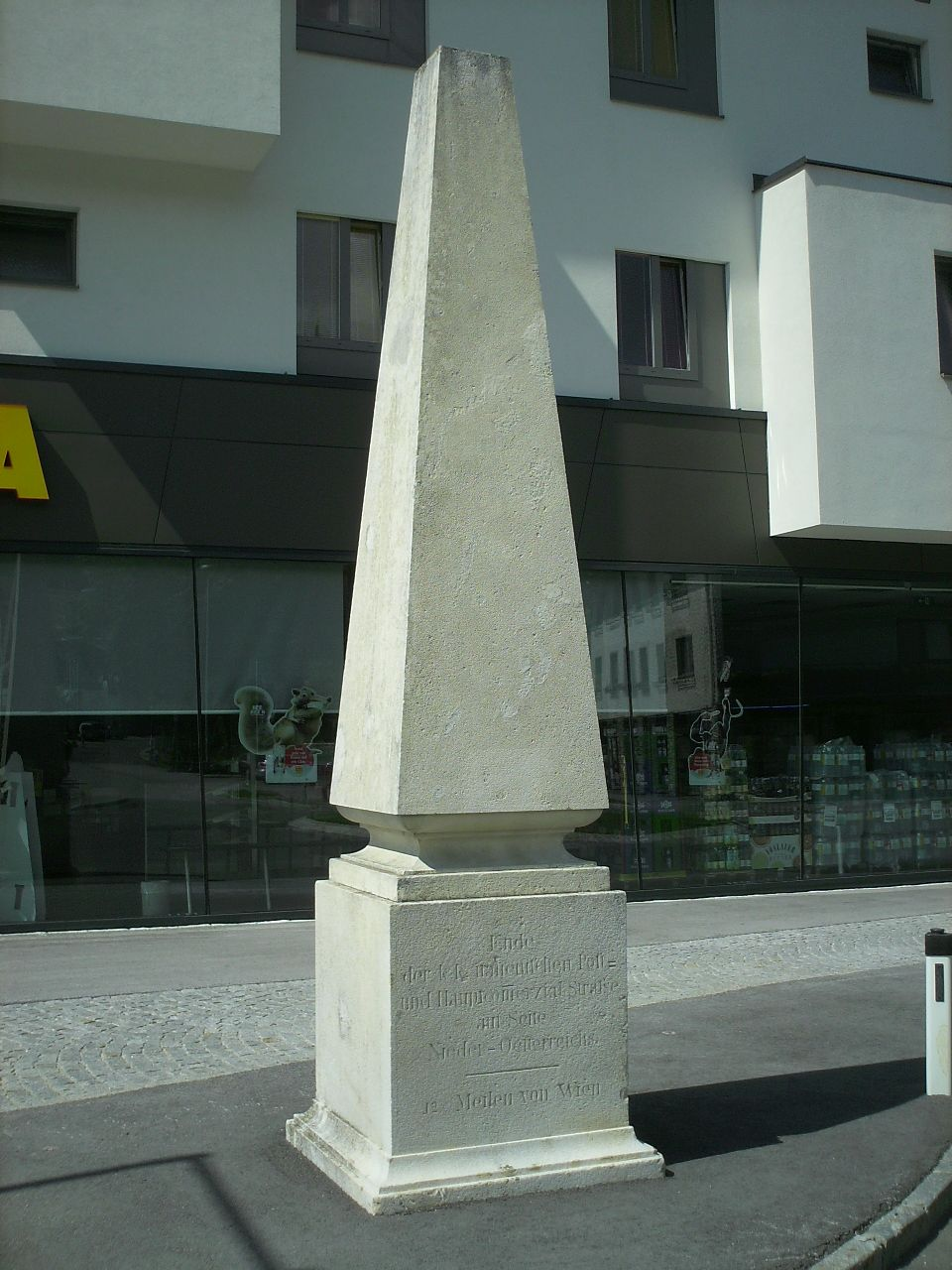 Historischer Meilenstein in Semmering: „Ende der k.k. italienischen Post- und Hauptcommerzialstraße auf Seite Nieder-Österreichs – 12 ½ Meilen von Wien“